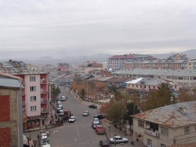 Karakocan.jpg